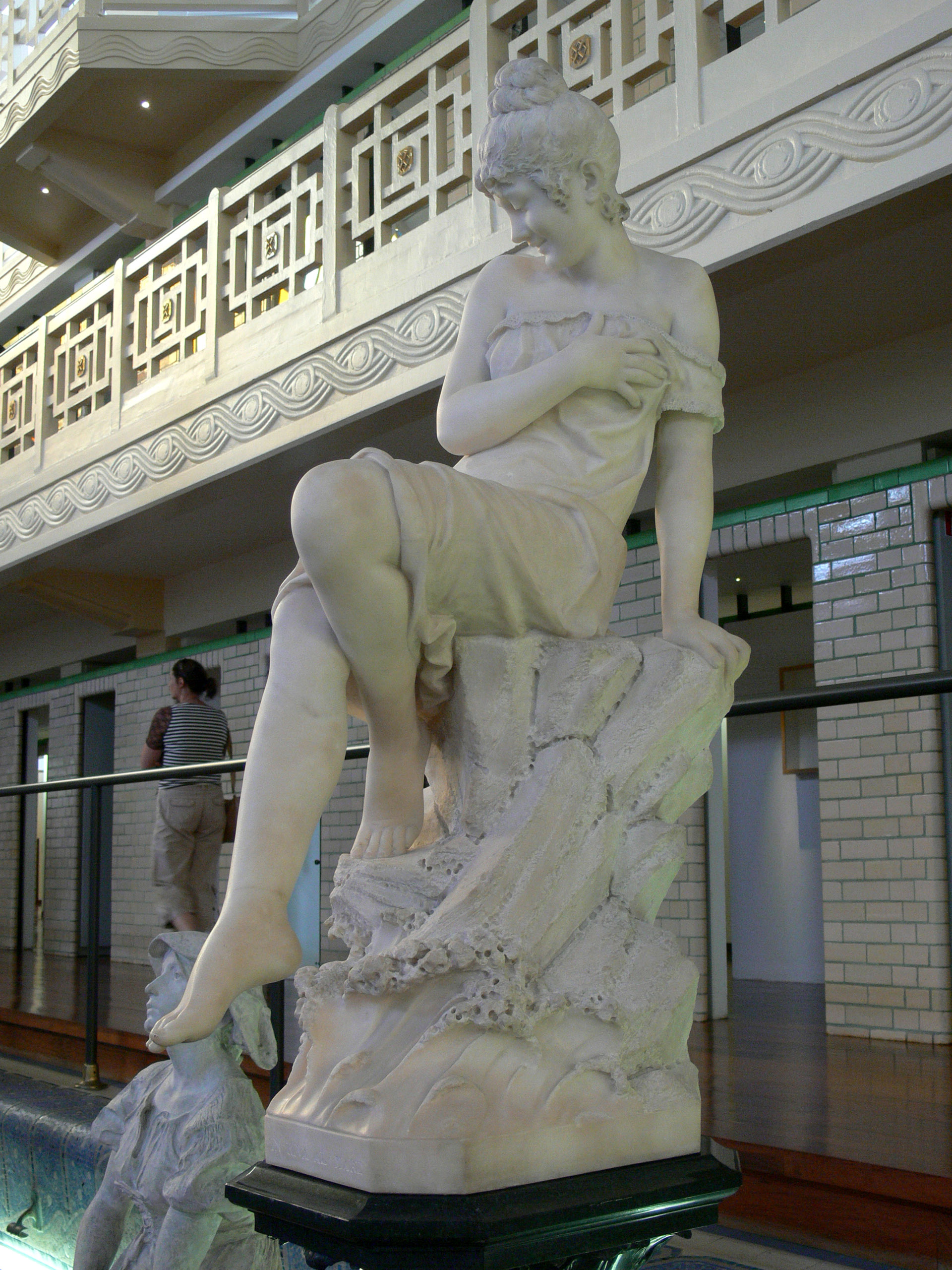 Sculpture de Cesare Lapini, né en 1848 et mort en 1888, intitulée « In riva al'mare » (Au bord de la mer), Legs de Henri Selosse en 1924 au Musée La Piscine, Musée d'Art et d'Industrie (Roubaix), oeuvre restaurée en 2000 - n° inventaire 11797